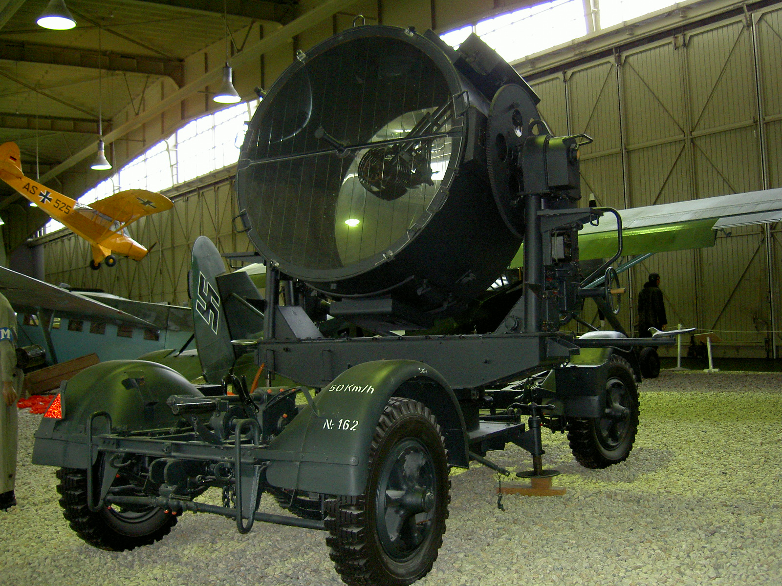 150-cm-Flakscheinwerfer 34 auf Sonderanhänger 104, Arbeitsspannung 78 V, Leuchtweite 10.000 m, Leuchthöhe 12.000 m im Luftwaffenmuseum Berlin-Gatow